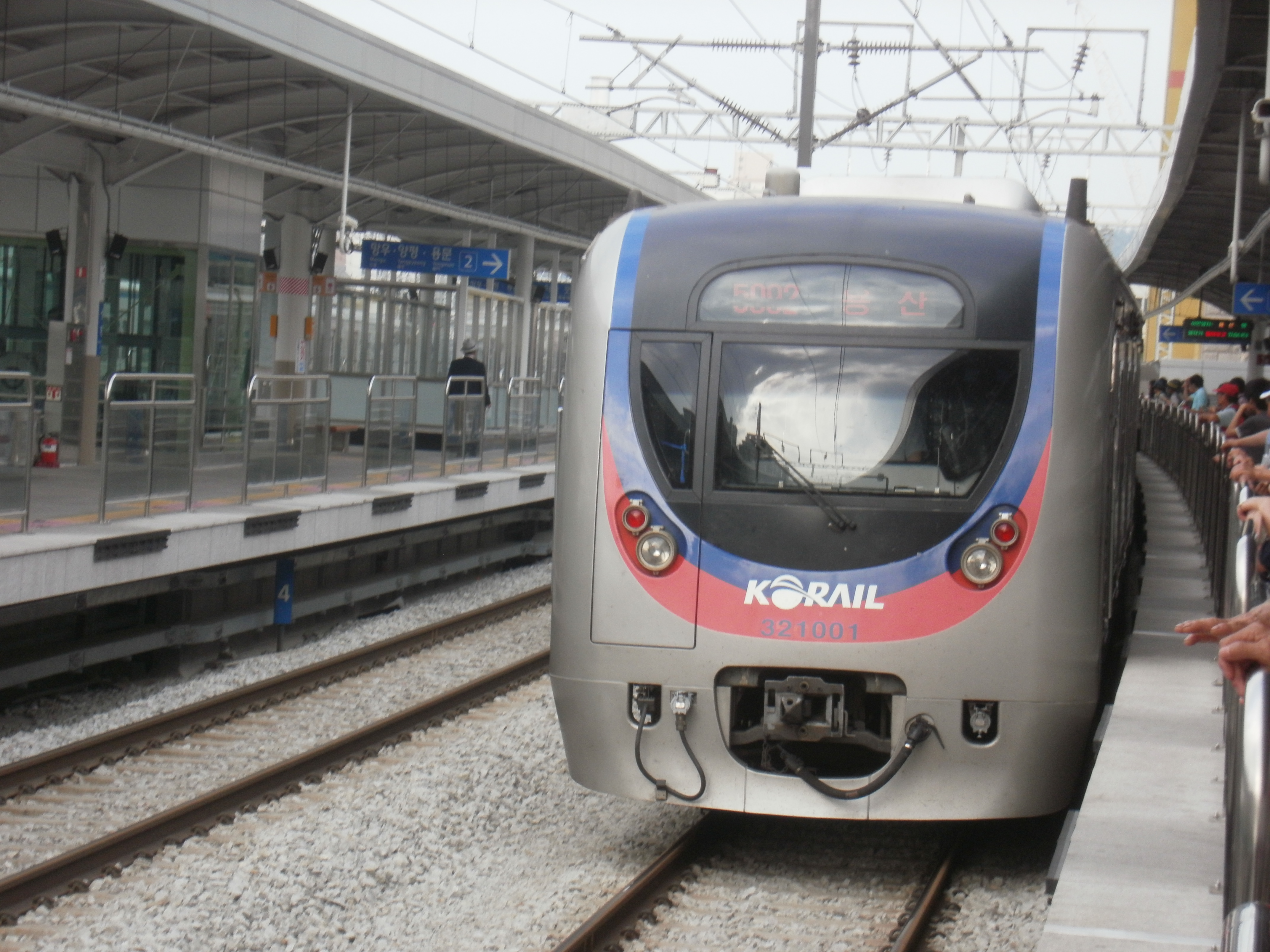 상봉역 진입중인 32101편성